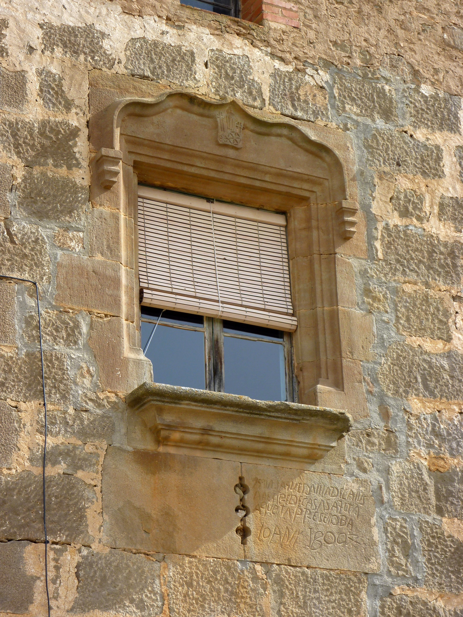 Mas Socarrats (Torà): detall d'una finestra